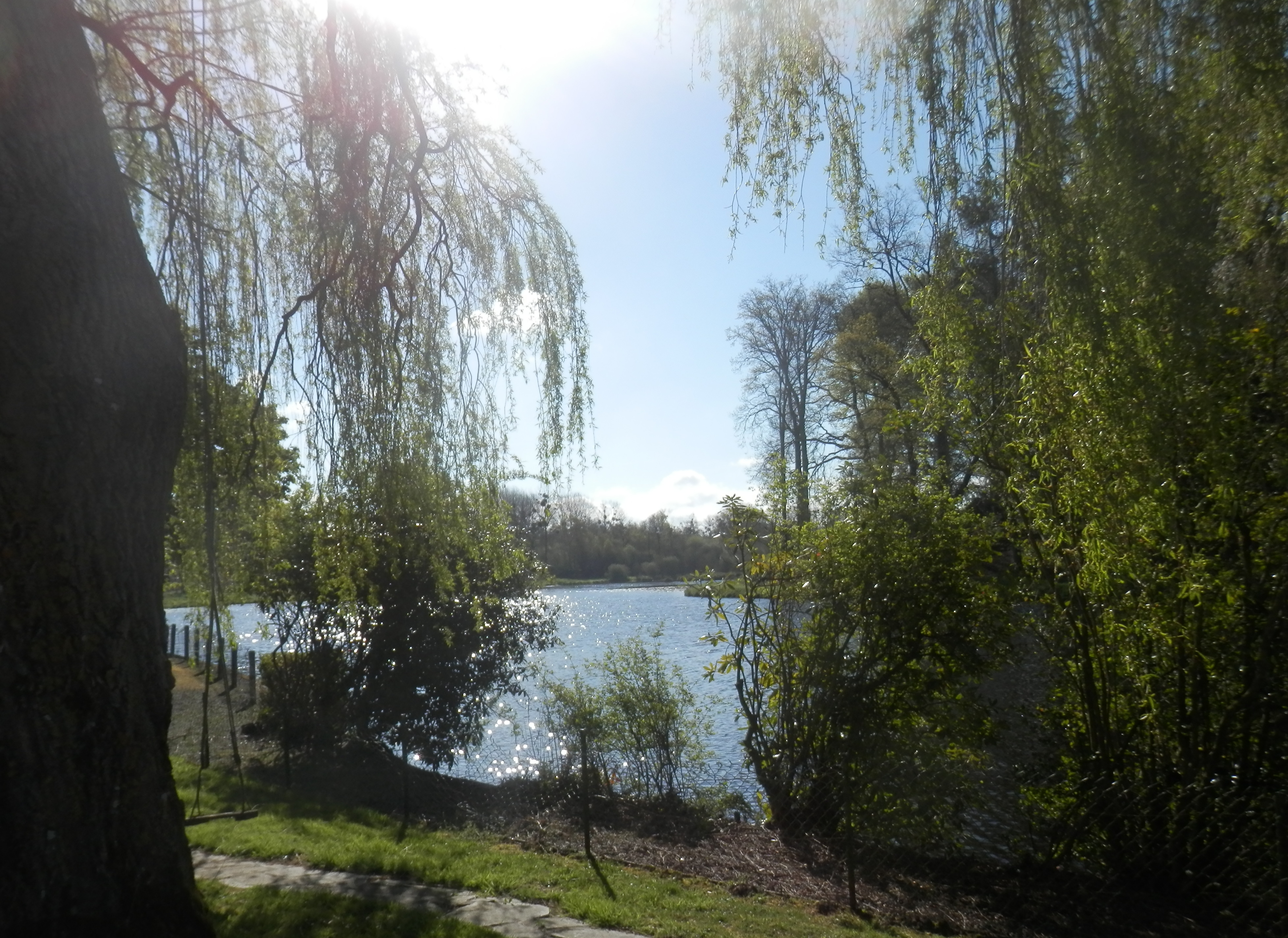 Étang de Valaine, Le Ferré (35420)